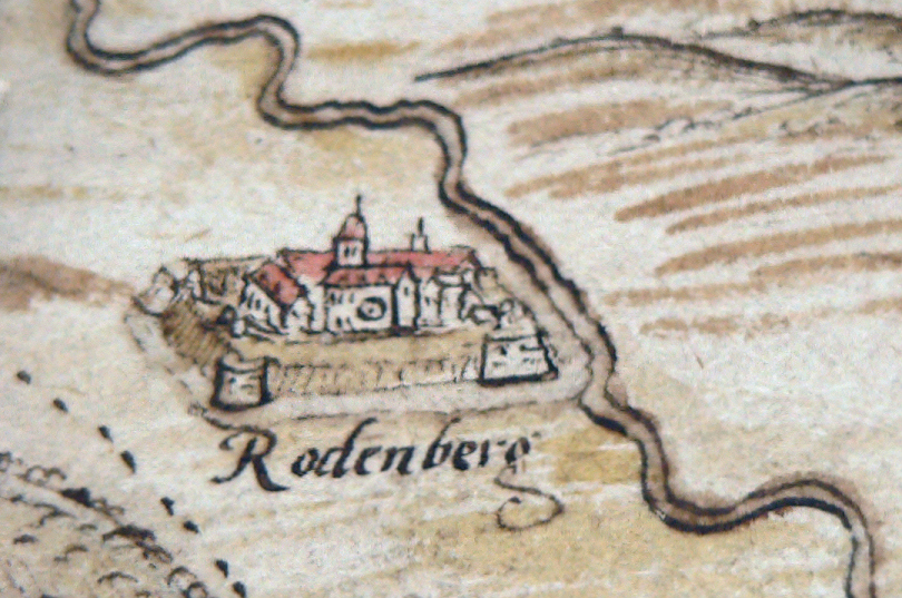 Belagerung Rodenberg in Stiftsfehde